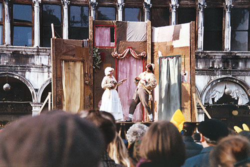 commedia dell’arte sur la place Saint Marc à Venise